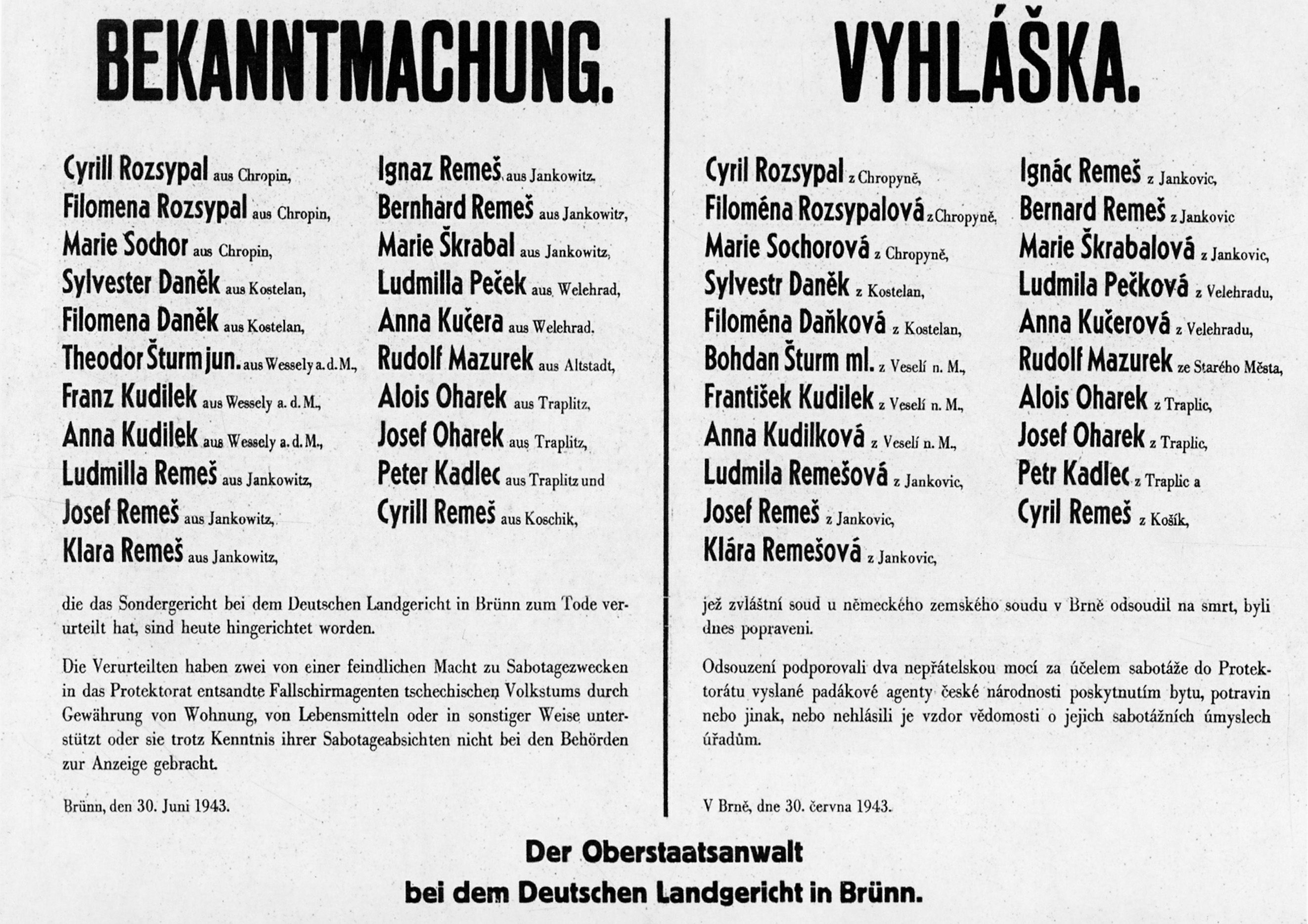 Vyhláška o popravě moravských bojovníků proti nacismu; památník těmto obětem je ve Vídni – viz zde